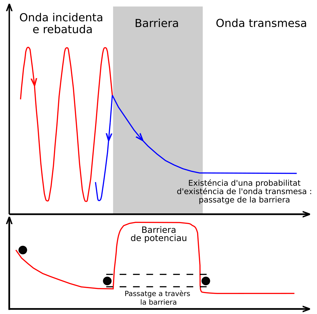 Representacion de l'efiech tunèu.